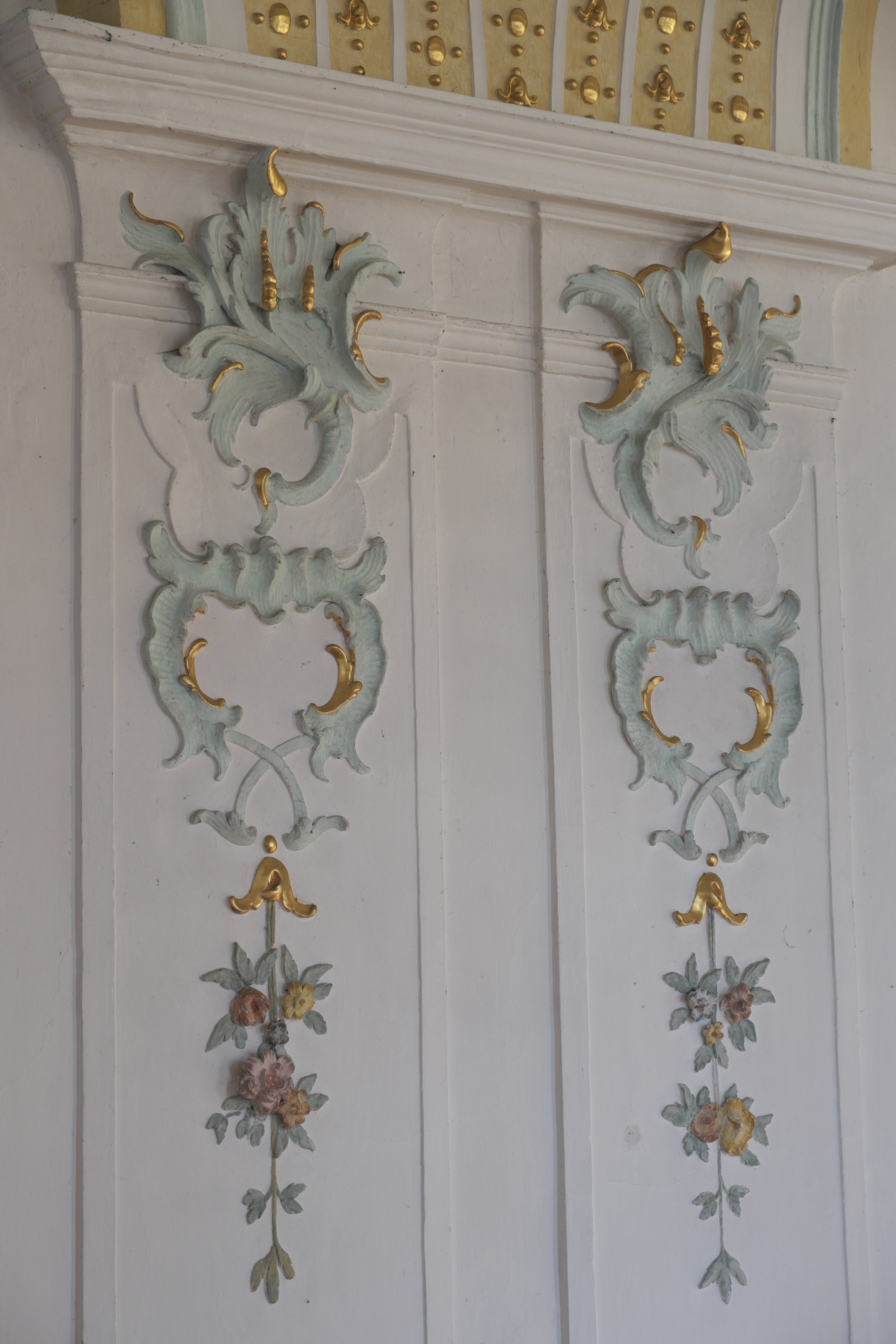 Katholische Pfarrkirche St. Petrus und Paulus in Petzenhausen, einem Ortsteil von Weil (Oberbayern) im Landkreis Landsberg am Lech (Bayern/Deutschland), Stuckdekor von Franz Xaver Schmuzer, um 1750